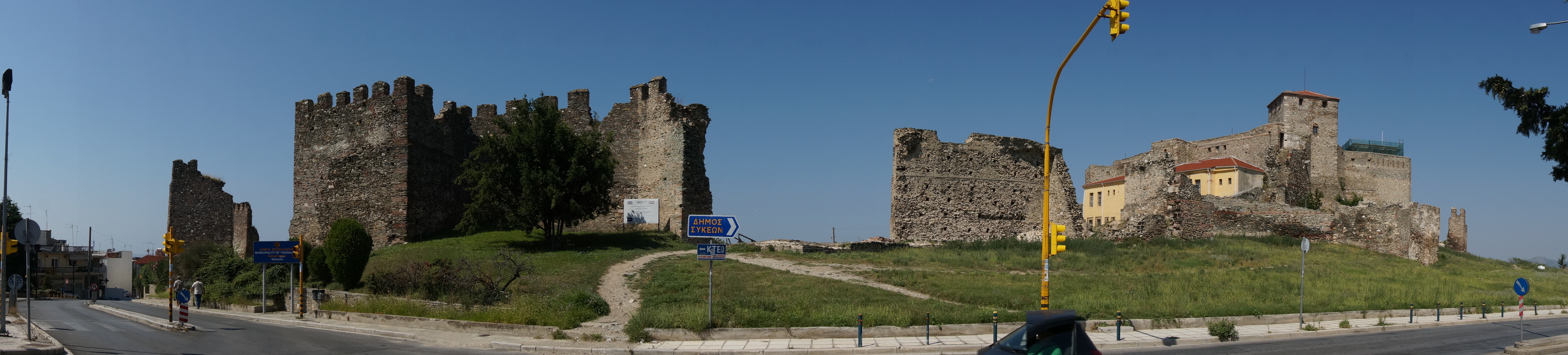 vue sur l'heptapyrgion.